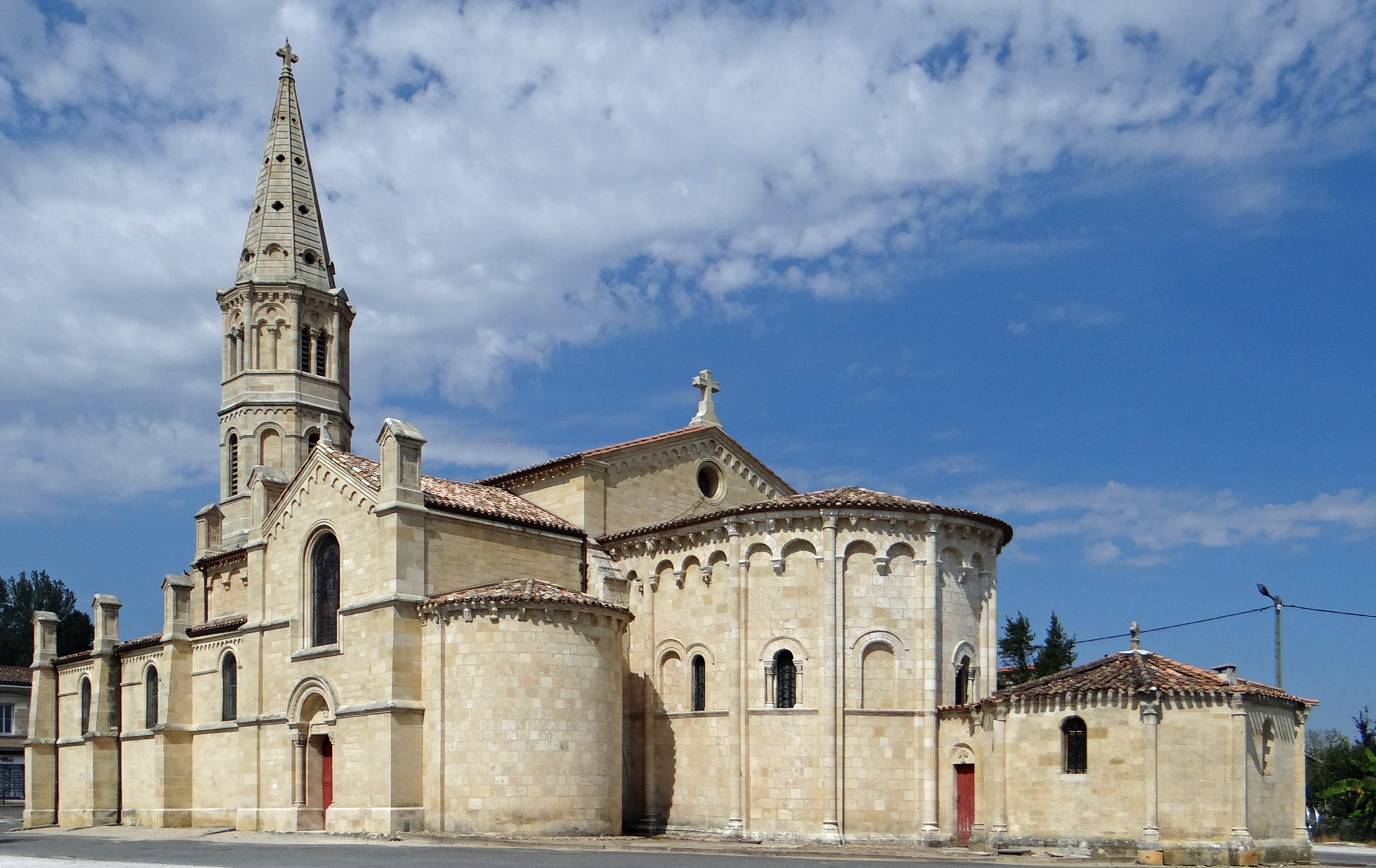 Léognan - Église Saint-Martin - Vue d'ensemble depuis le chevet